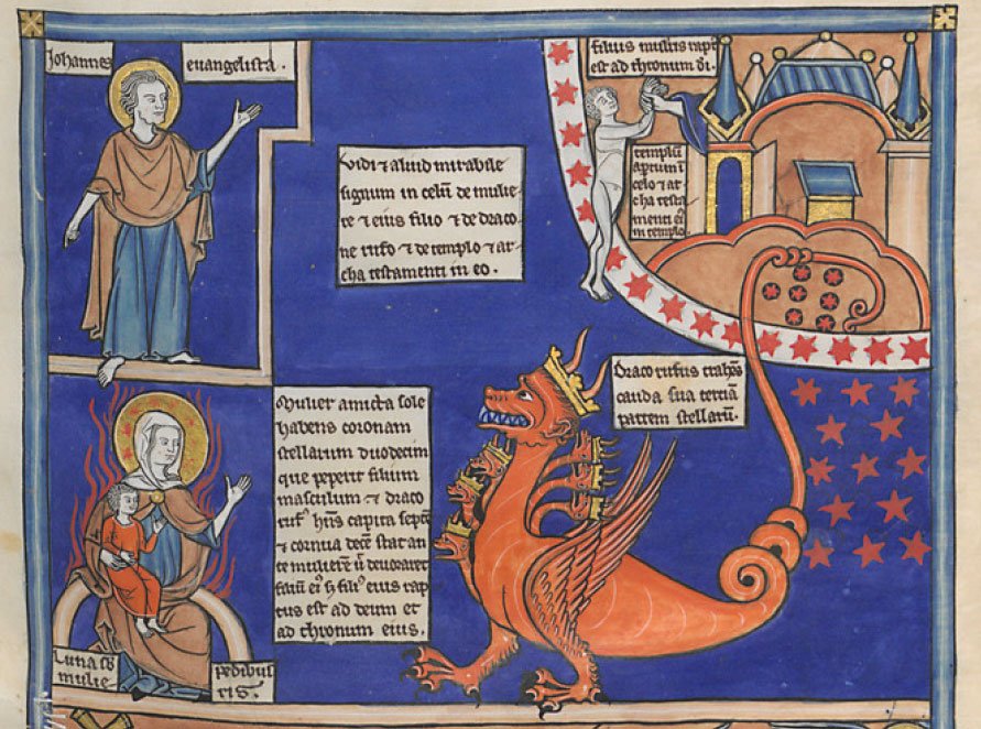 Illustration d'un passage de l'Apocalypse XII,1. Liber Floridus BNF, folio 39. Vers 1260